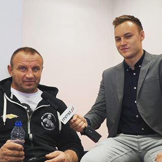 Mateusz Kaniowski i Mariusz Pudzianowski na KSW 51